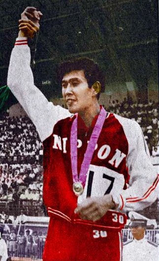 Hidehiko Tomizawa, 1970 Asian Games